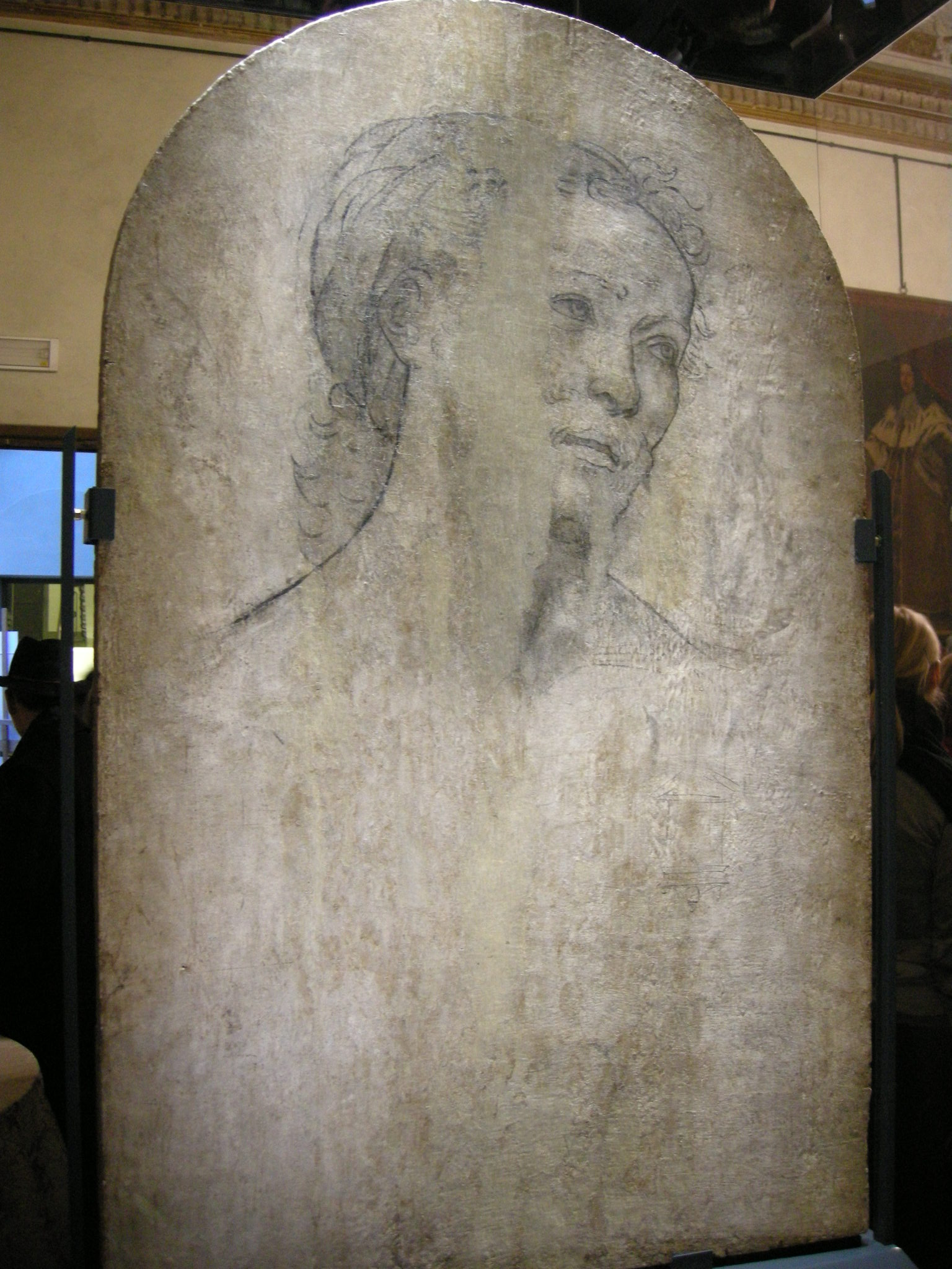 Palazzo medici riccardi, sala del trionfo delle belle arti, madonna col bambino di filippo lippi, retro, testa di s. girolamo